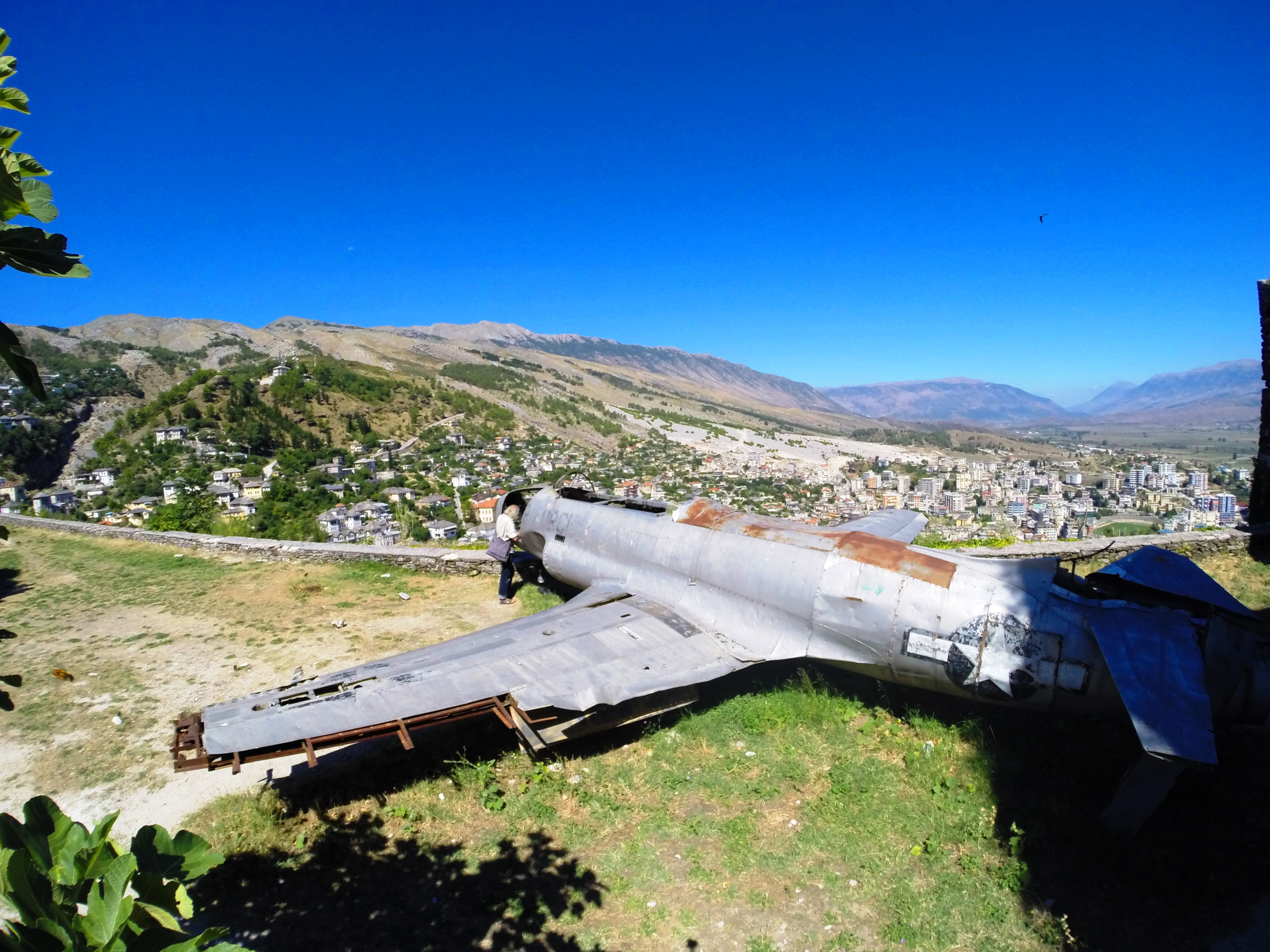 Kalaja e Gjirokastrës